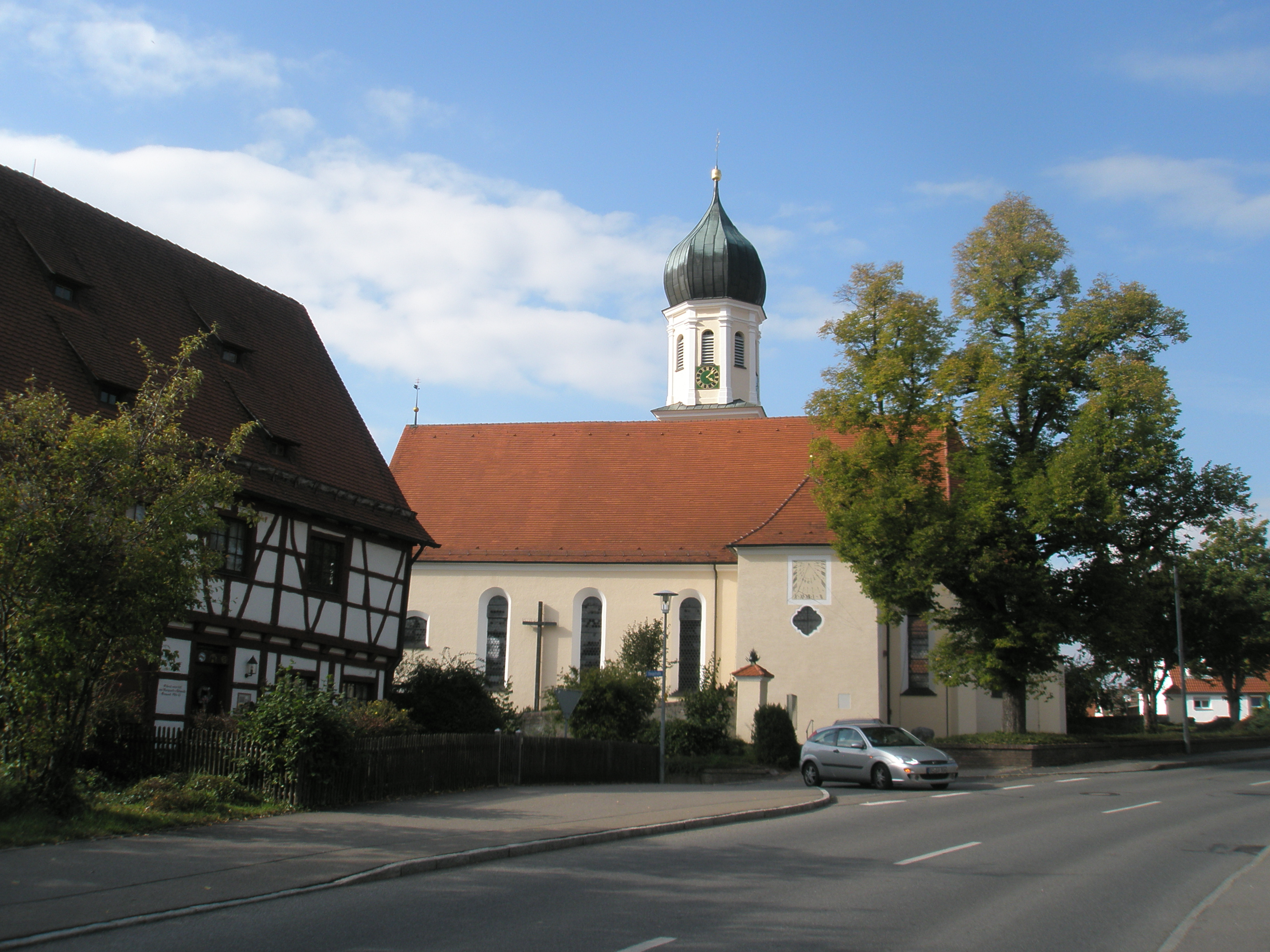 Die Schwendier Pfarrkirche St. Stephanus und das Pfarrhaus, ein Fachwerkhaus aus dem Jahr 1551.